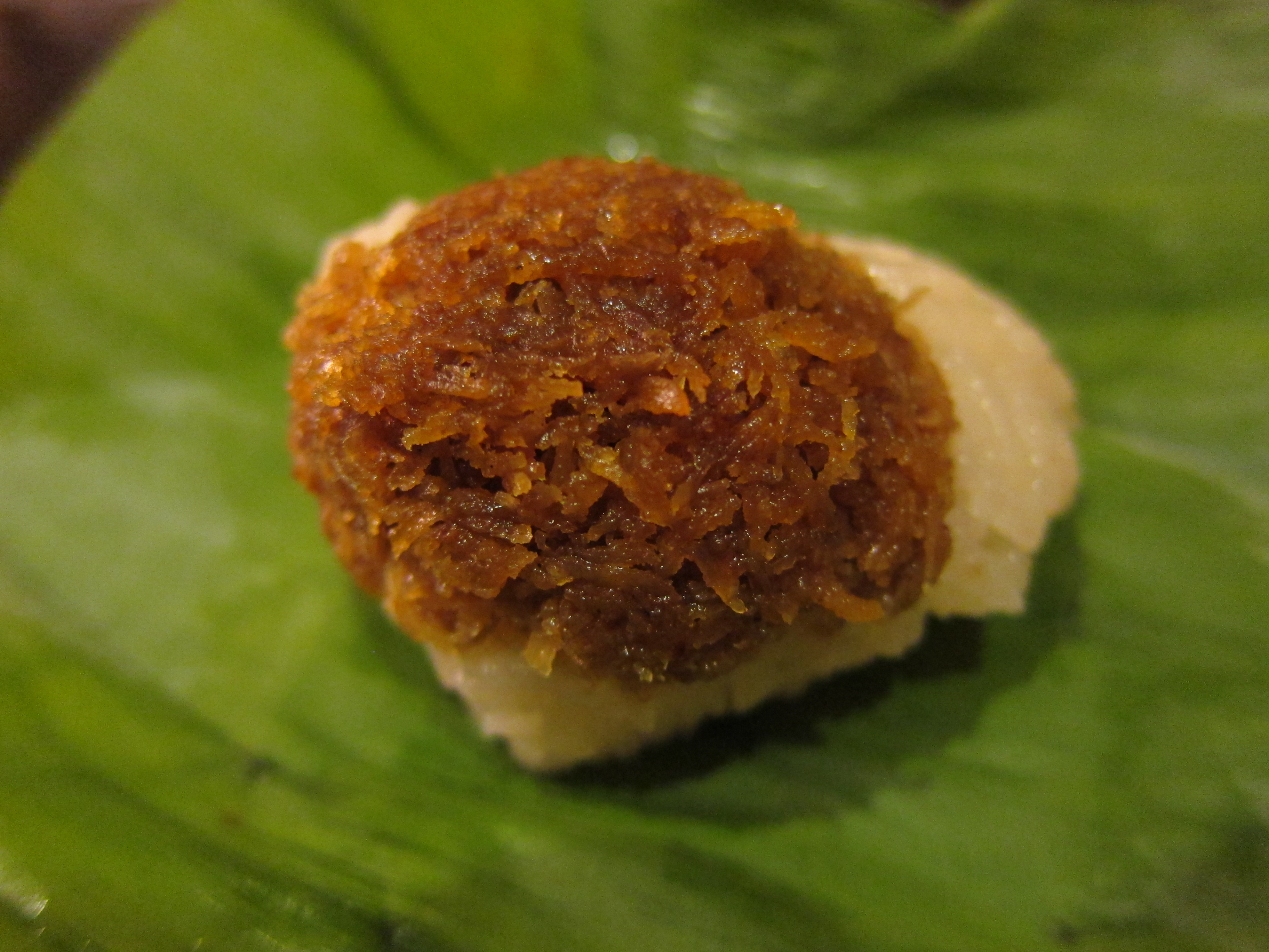 Pulut Inti in Malaysia